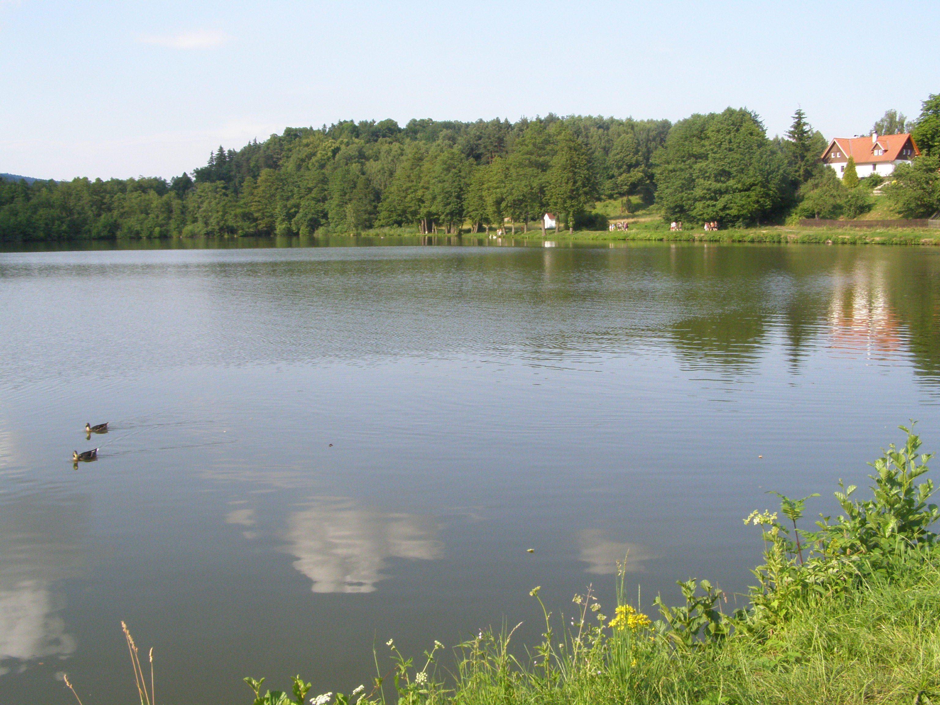 Česky: Jablonné v Podještědí, Markvartice, Markvartický rybník